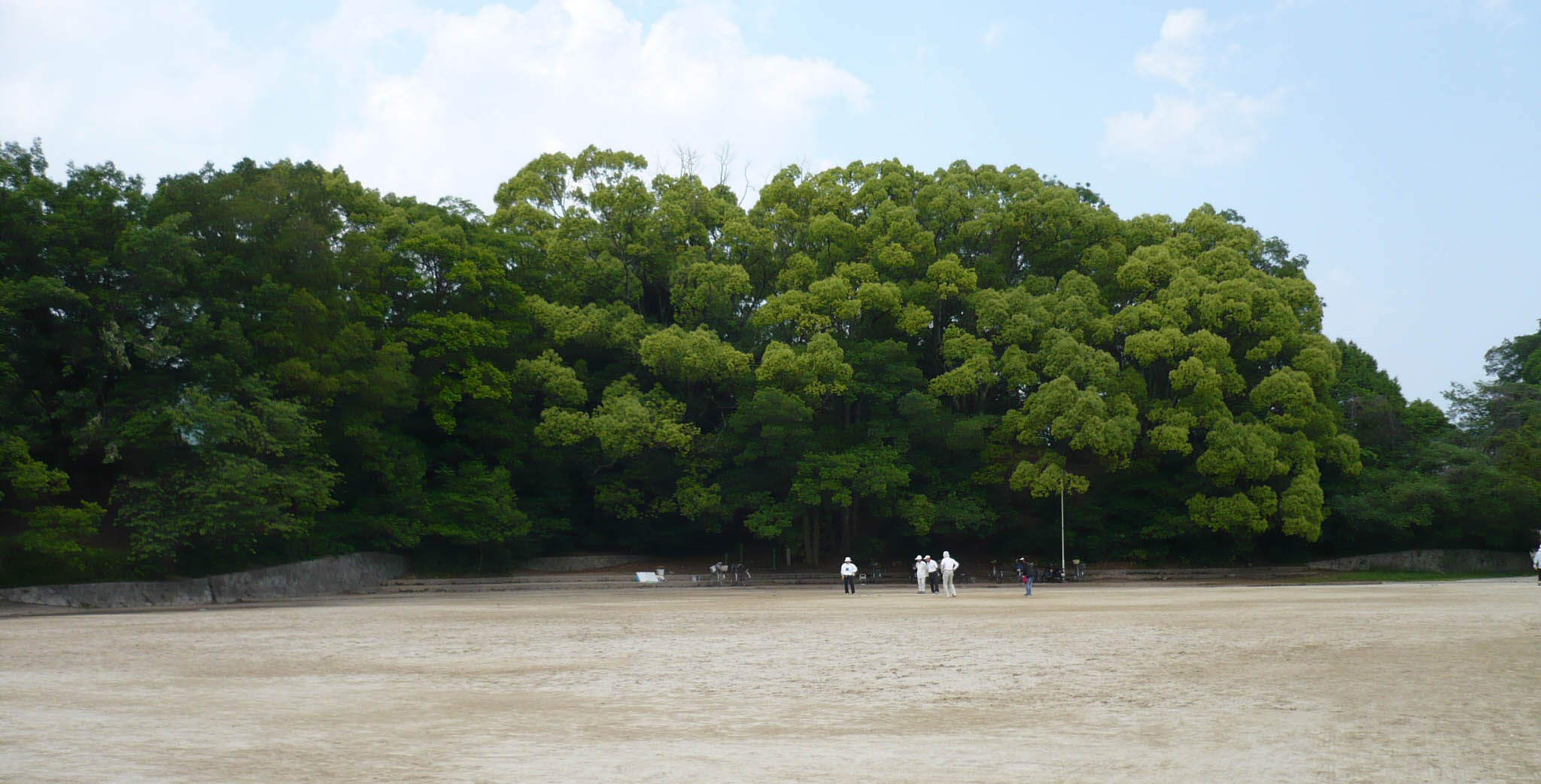 山科中央公園内にある土塁跡